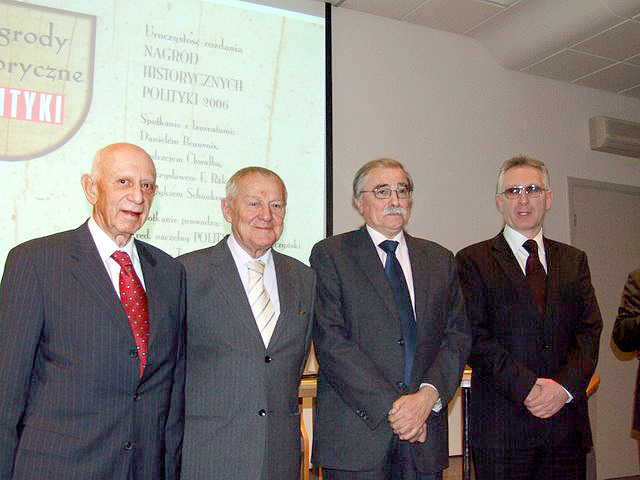 Laureaci podczas rozdania Nagrody Historycznych Polityki 2006: od lewej Henryk Schönker, Mieczysław F. Rakowski, Daniel Beauvois, Andrzej Chwalba. Warszawa, Tygodnik Polityka, ul. Słupecka 6.